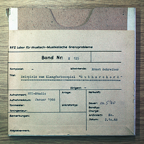 Bandbeschriftung zu Tonaufnahmen vom Subharchord aus dem Rundfunk- und Fernsehtechnischen Zentralamt der Deutschen Post der DDR (RFZ), Januar 1968. Das Subharchord ist ein 2002 wiederentdecktes elektronisches Klanginstrument, das ab Ende der 50er Jahre in der DDR entwickelt worden war.